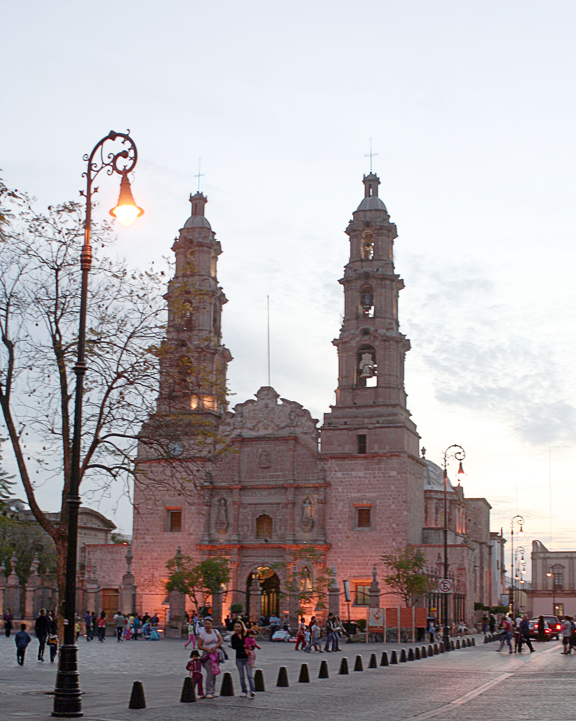 CATEDRAL BASÍLICA DE LA VIRGEN DE LA ASUNCIÓN